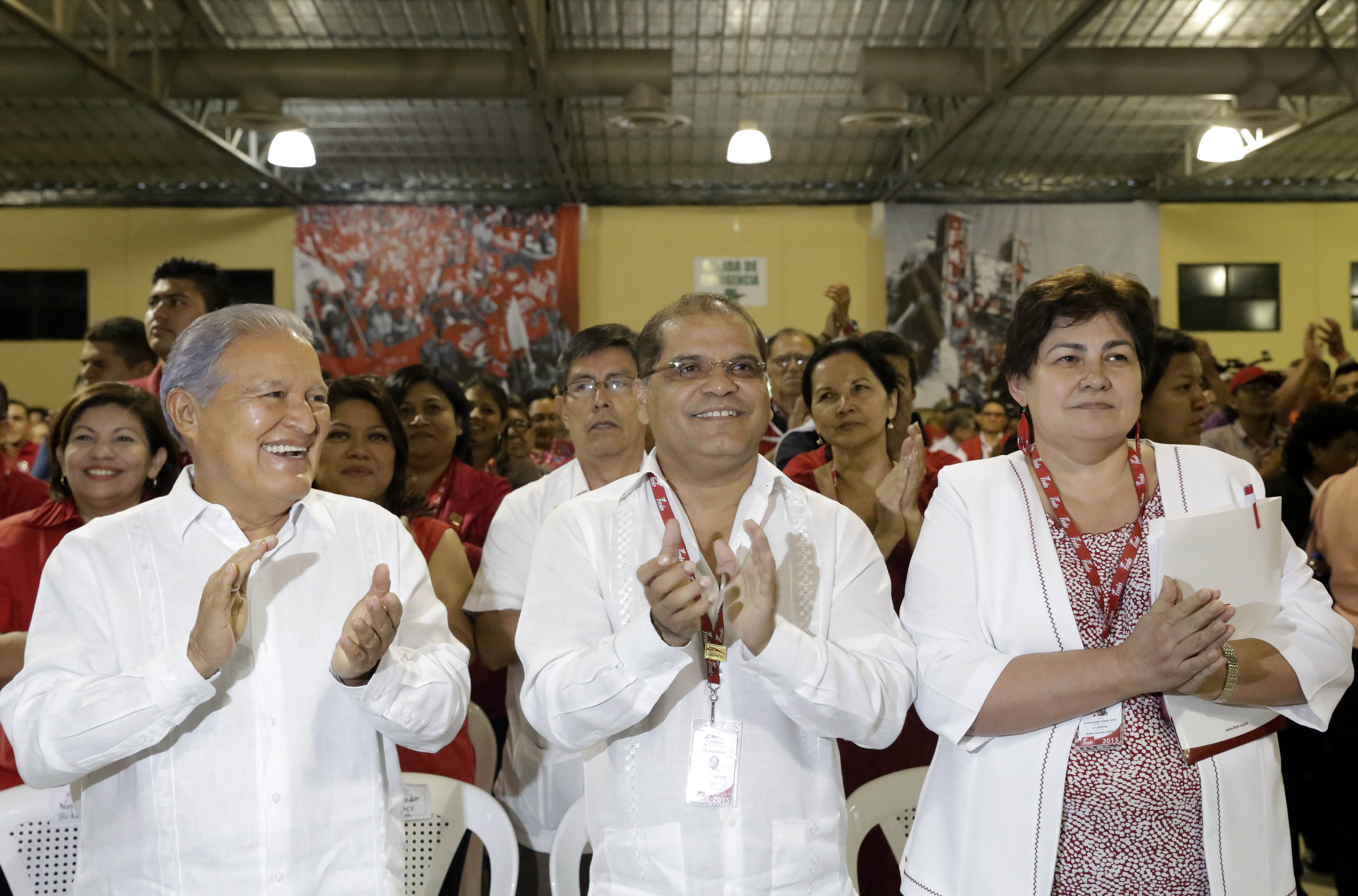 Salvador Sánchez Cerén y Óscar Ortiz en el Primer Congreso General del FMLN.